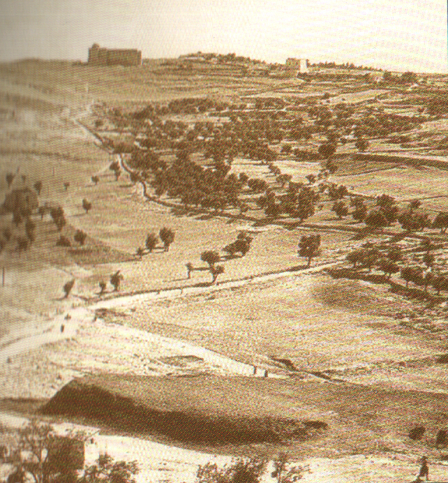 Єврейський_університет_30і_роки_ХХ_ст.jpg: Єврейський університет на горі Скопус у 1930-і роки ХХ століття